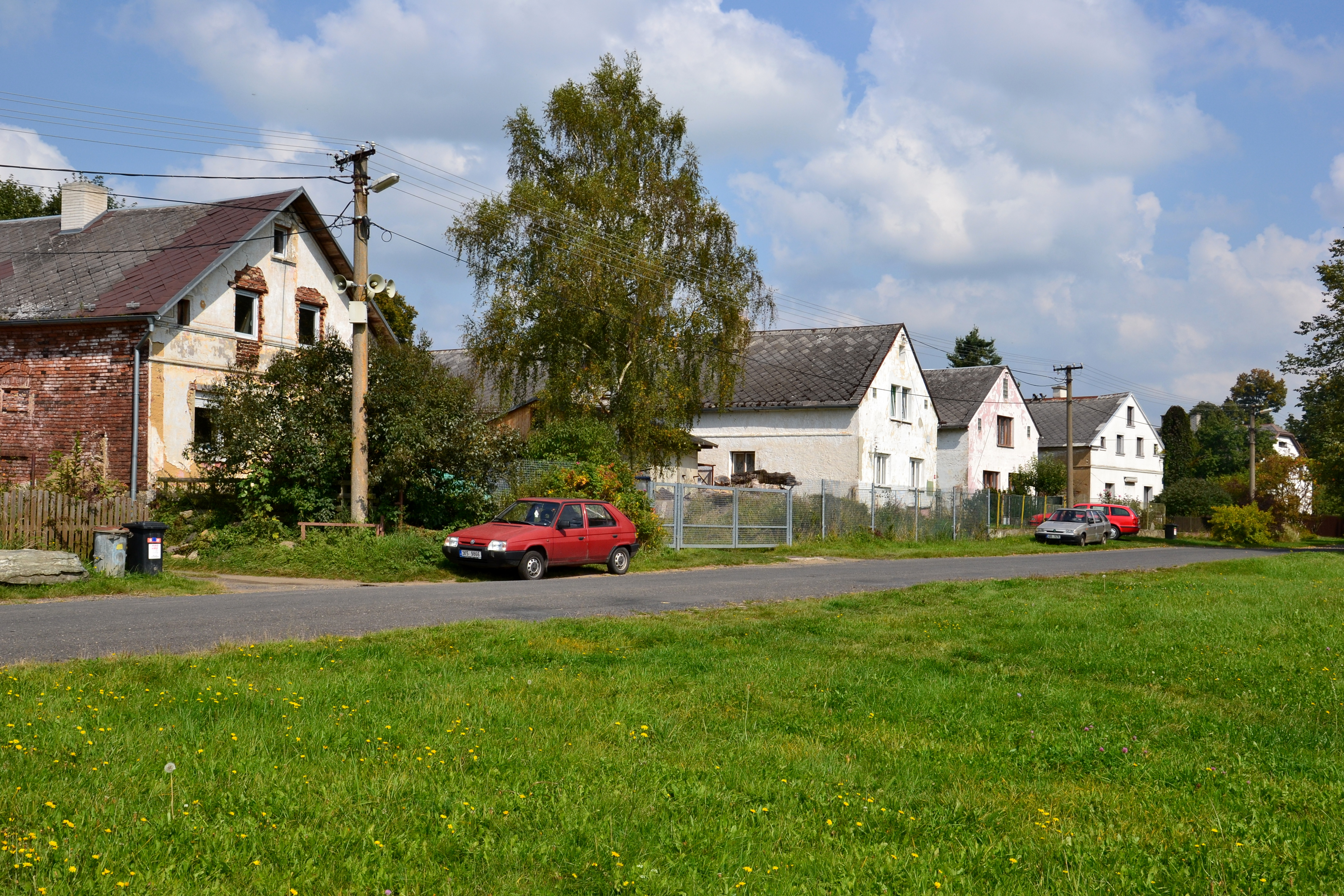 Domy na návsi